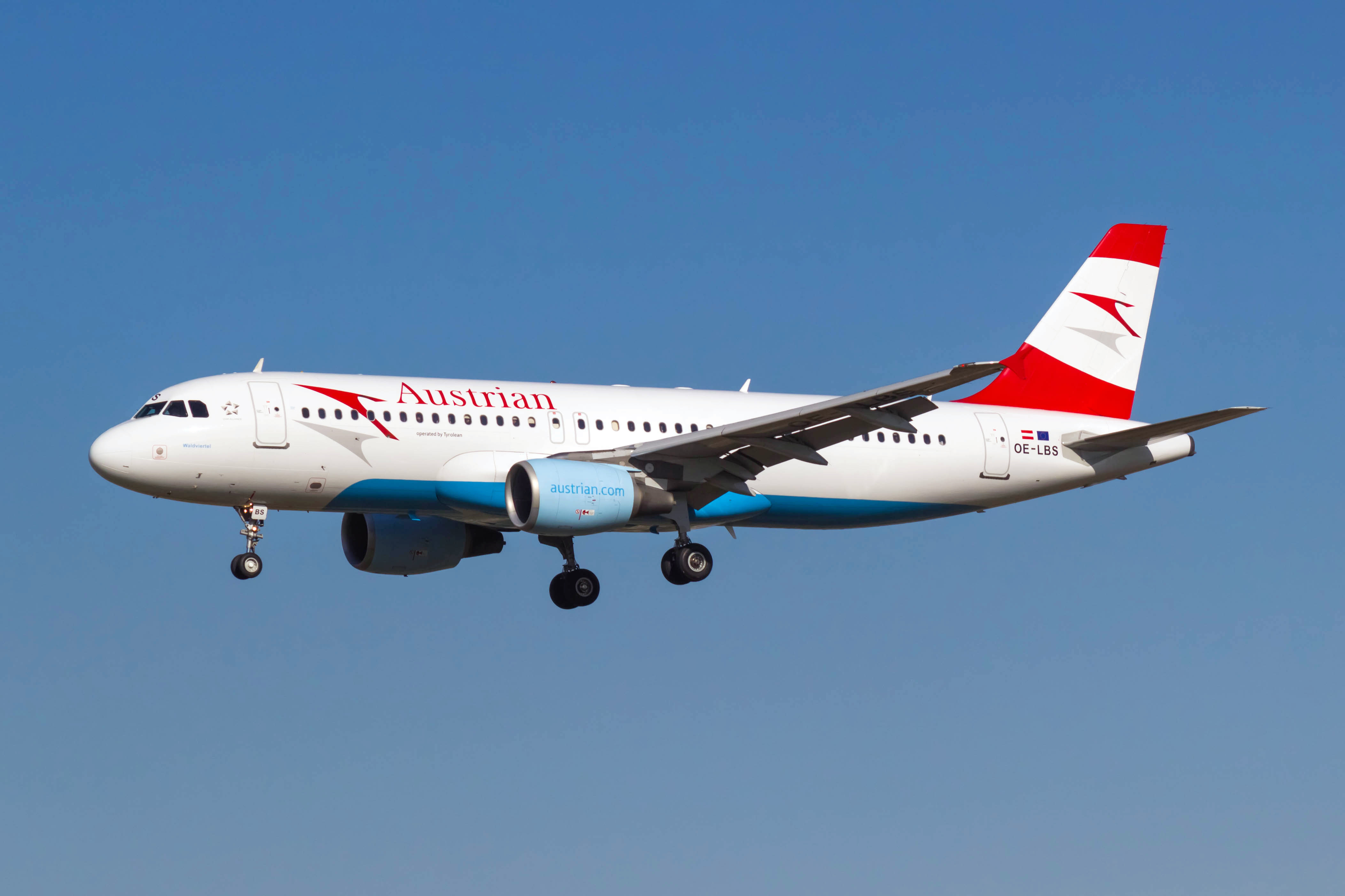 Airbus A320 de Austrian Airlines aterrando no aeroporto de Barcelona.